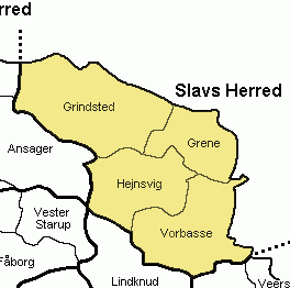 Slavs Herred Ribe Amt, Denmark Map by Svend-Erik Christiansen , edited by Nico-dk.